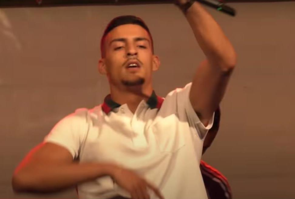 Optreden van Boef op het Twentse Lente Festival, 2017